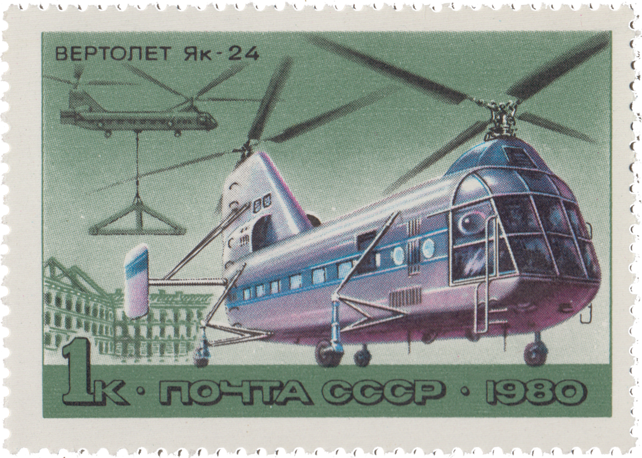 Почтовая марка СССР. 1980. Авиа